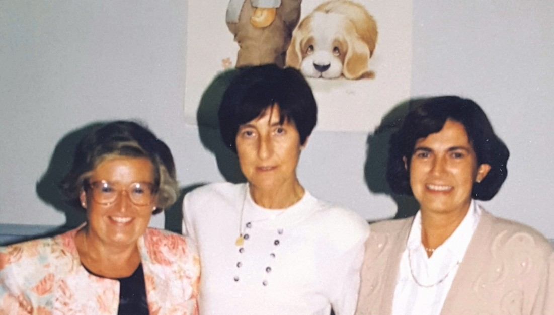 Zurriolako lehen andereñoak